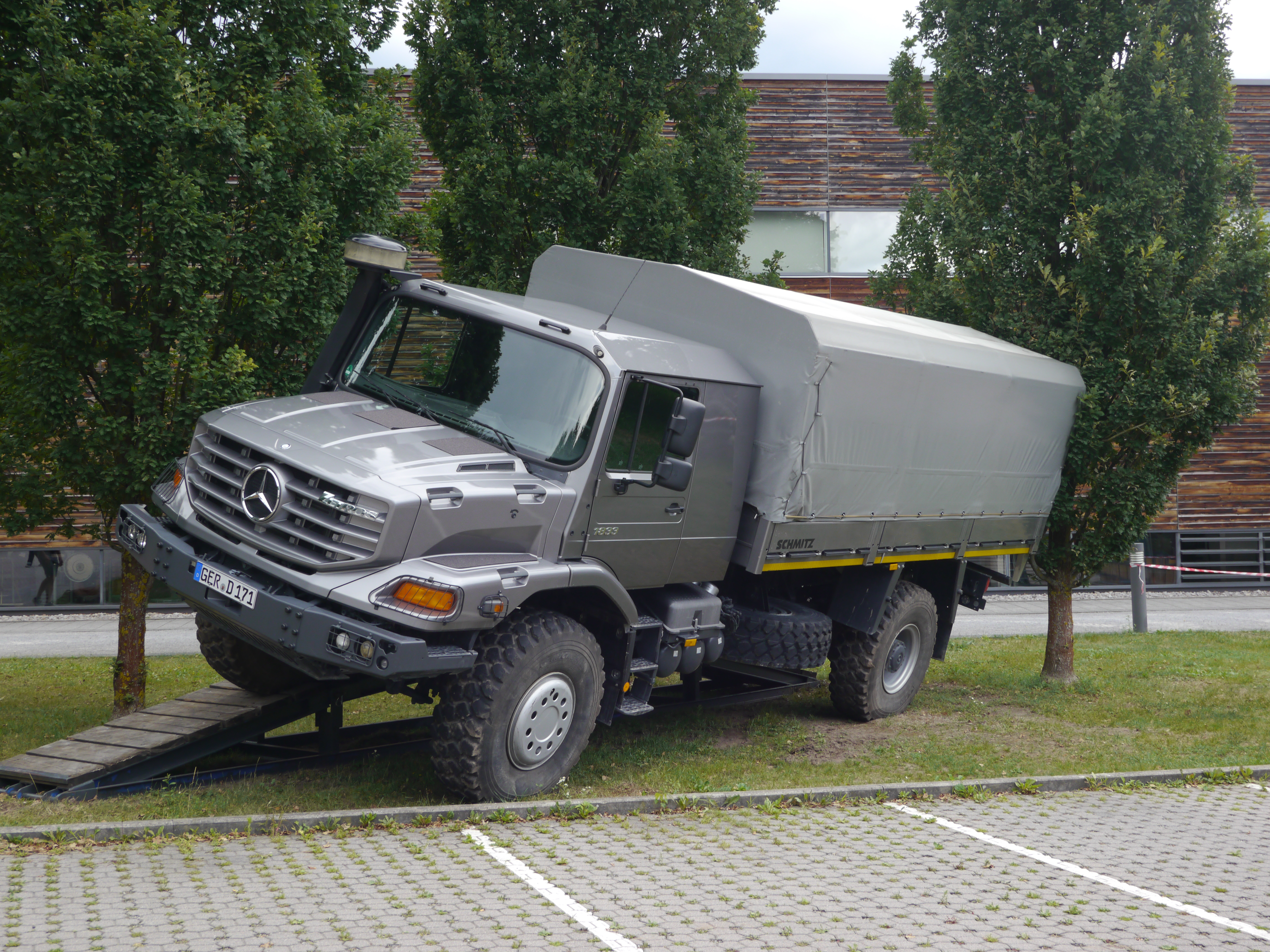 Unimog-Museum Weltenbummlertreffen 2017 02